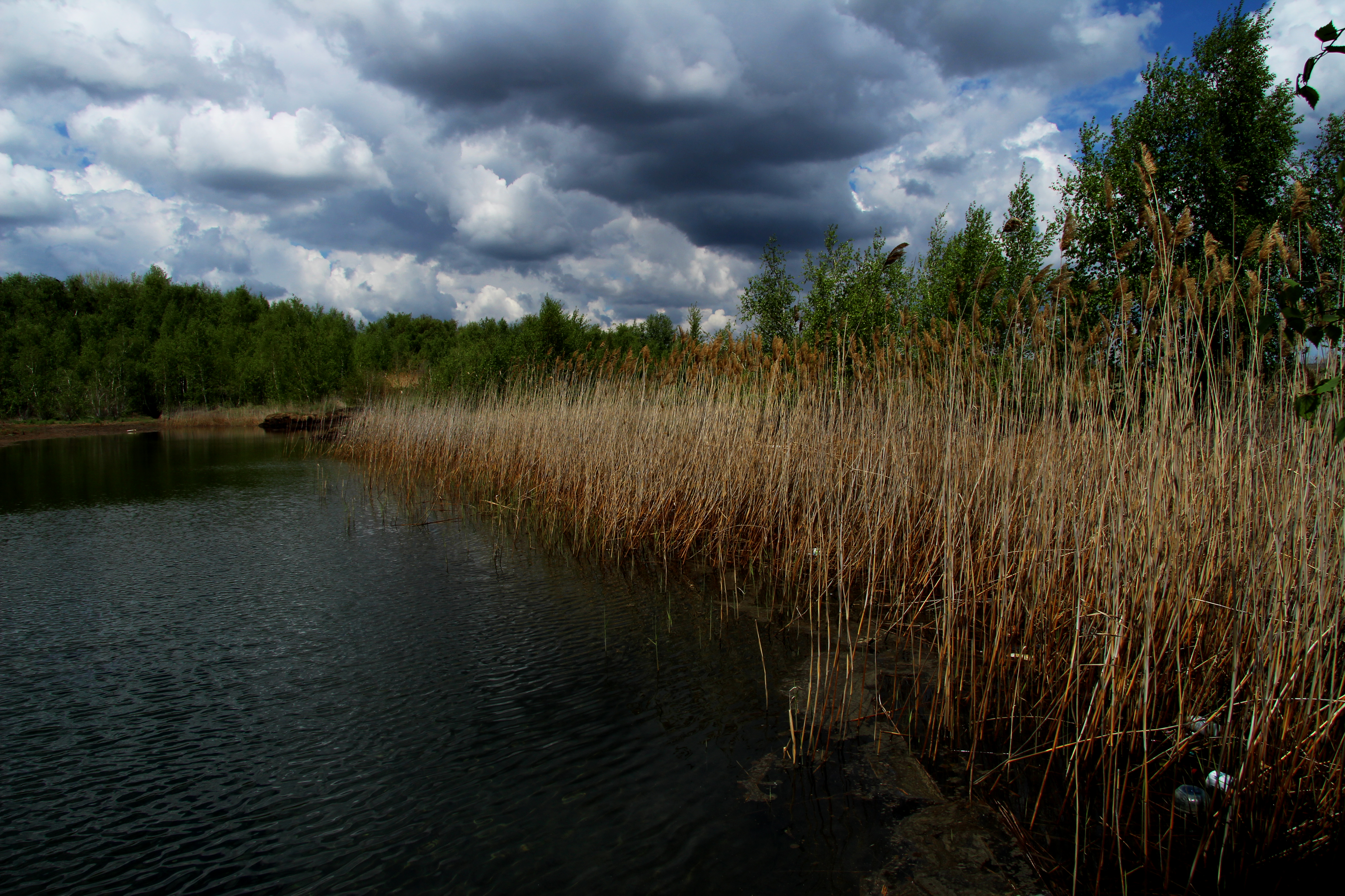 Купоросное озеро, Гайский район This image is related to the protected area of Russia number 5610027